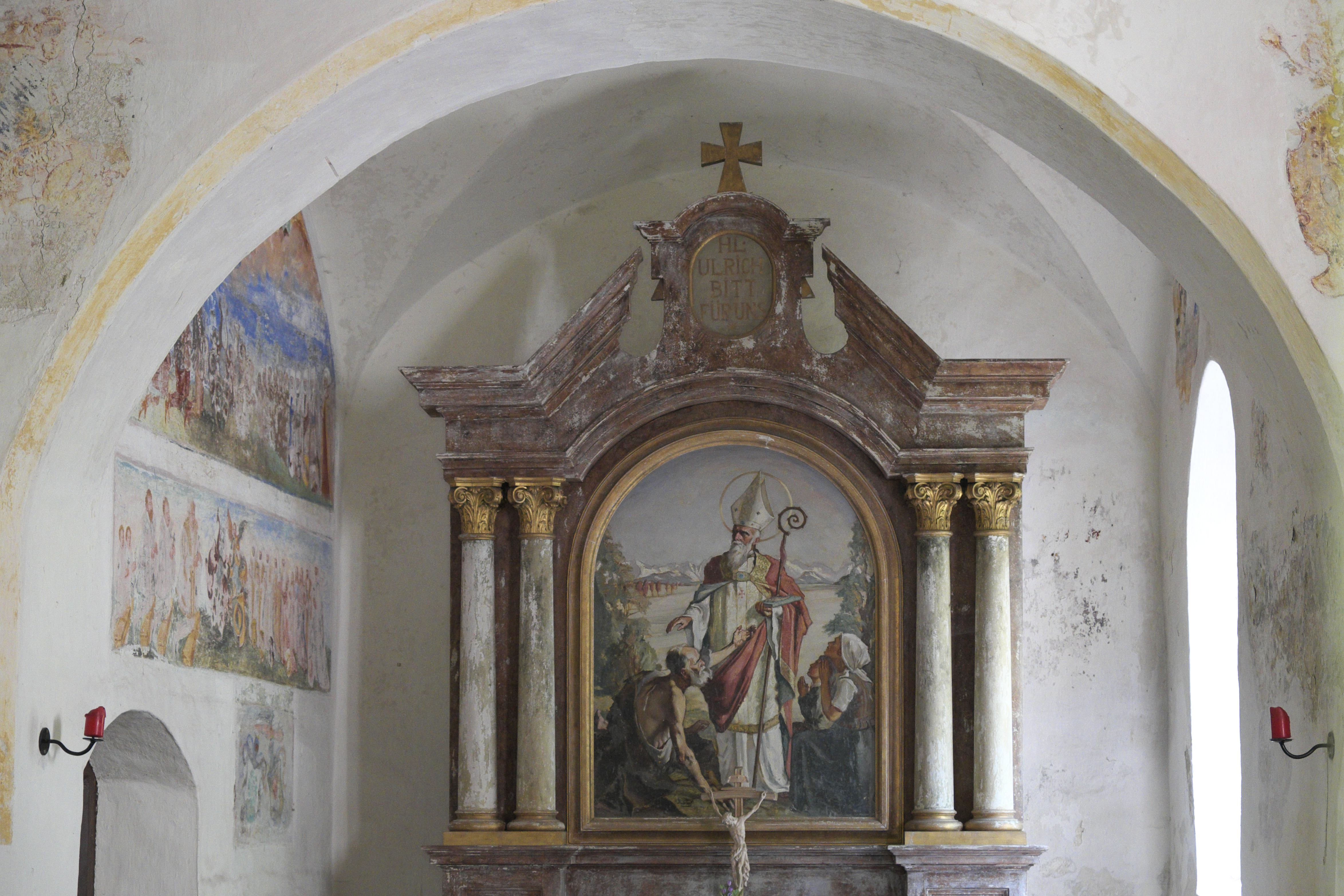 Katholische Filialkirche St. Ulrich in Königswiesen (Gauting) im Landkreis Starnberg (Bayern, Deutschland), Altarbild, Darstellung: heiliger Ulrich